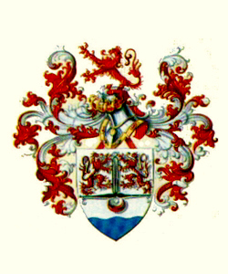 Scan eines alten Wappenfotos aus dem 19. Jahrhundert